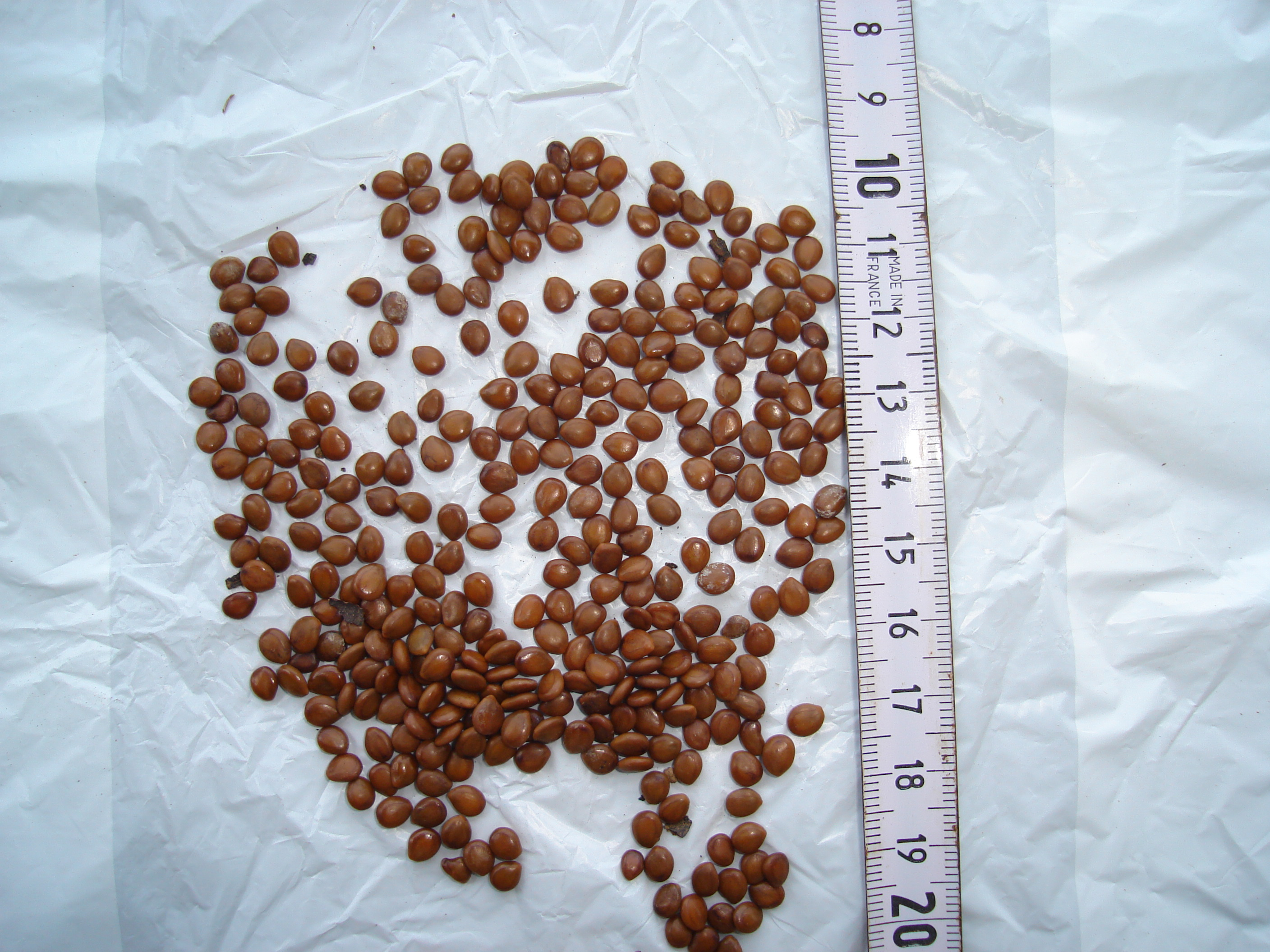 Semillas de Dichrostachys cinerea, planta invasora e indeseable (weed), fotografiadas en Pinar del Río, Cuba.